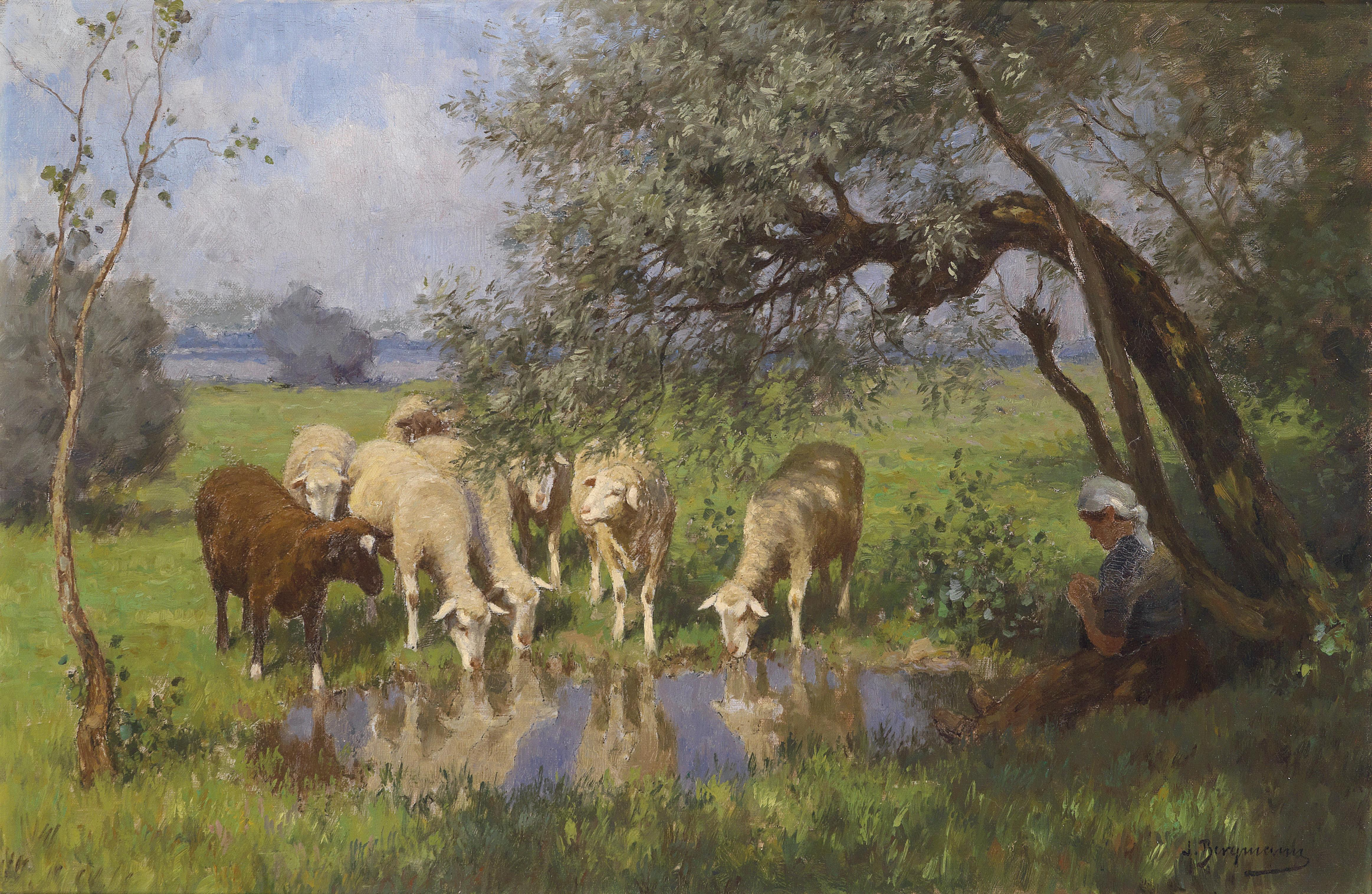 Die Schafhirtin bei der Rast, signiert J. Bergmann, Öl auf Leinwand, 51 x 77 cm